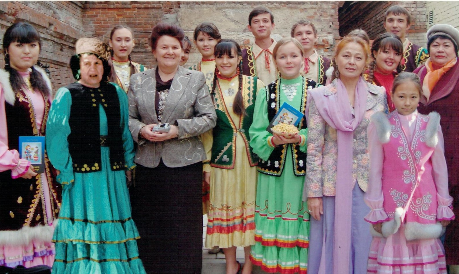 Встреча со студентами Башкирского государственного педагогического университета членов Общества башкирских женщин